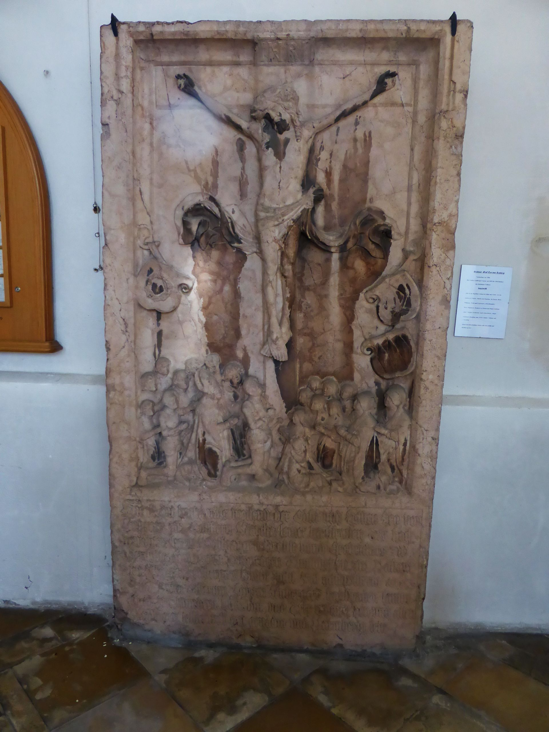 Pfarrkirche Triftern